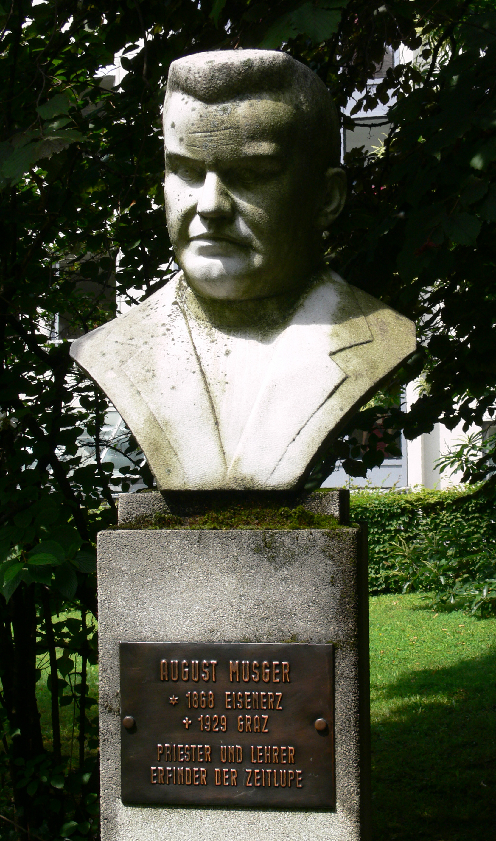 Steirische Ehrengalerie in einem Hof der Grazer Burg: Büste „August Musger“ von Gottfried Prabitz, 1959